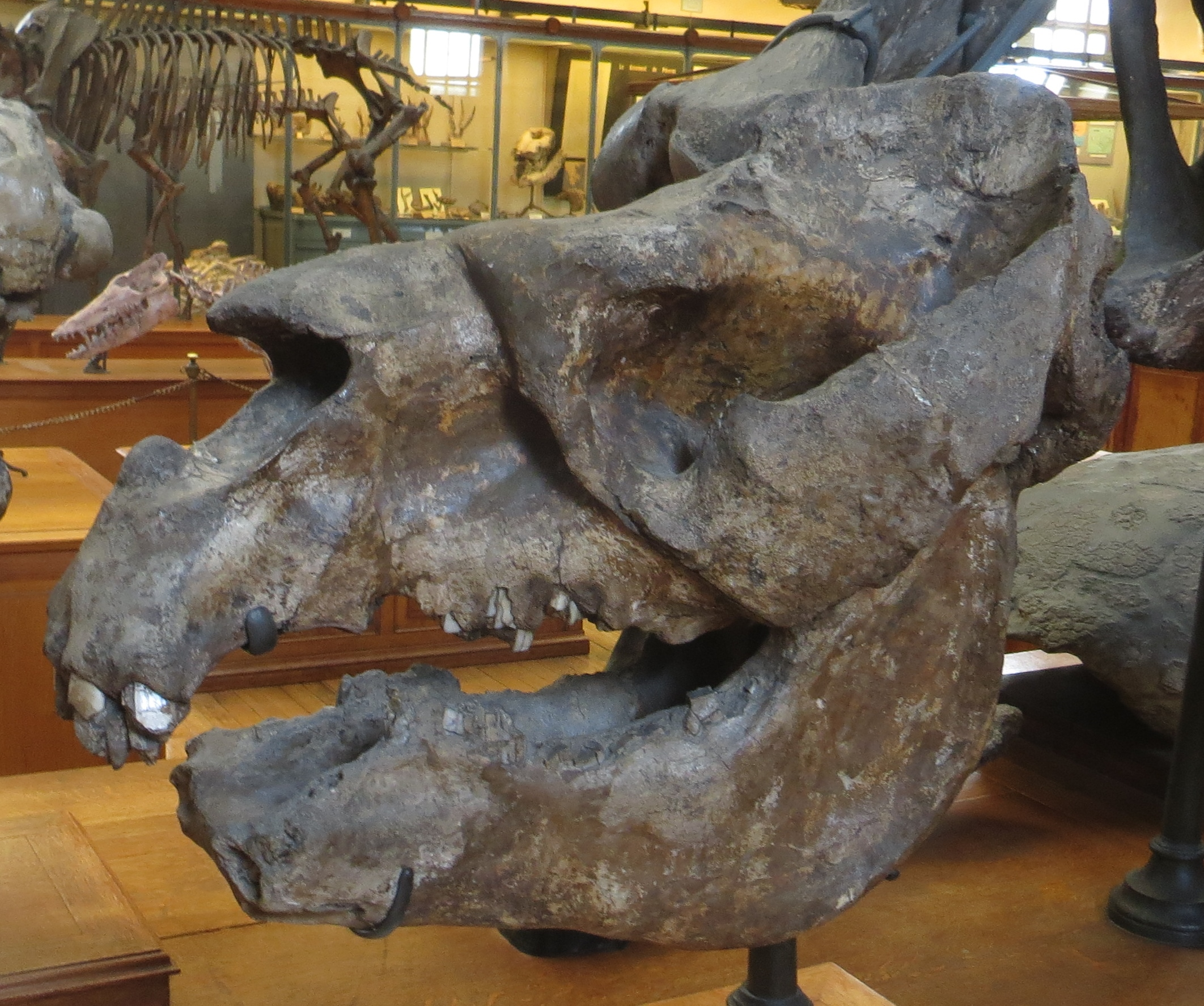 Toxodon fossil